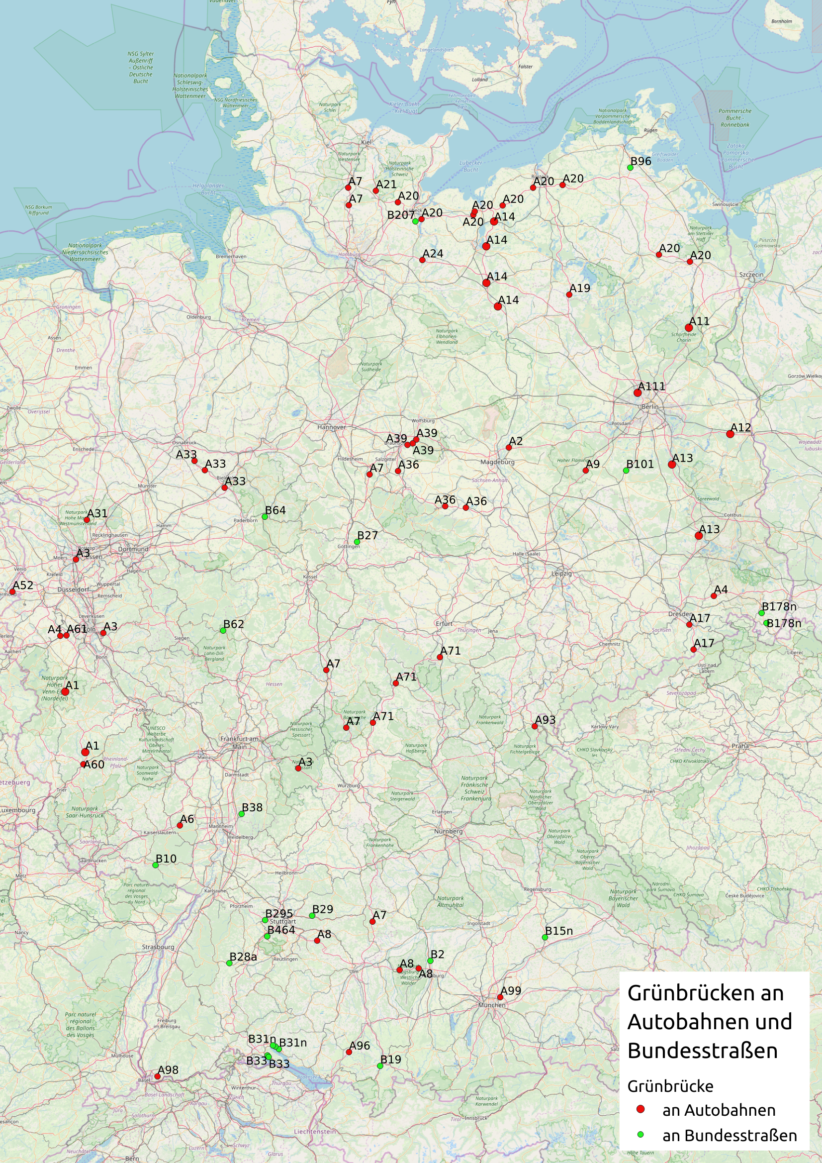 Karte der Grünbrücken in Deutschland